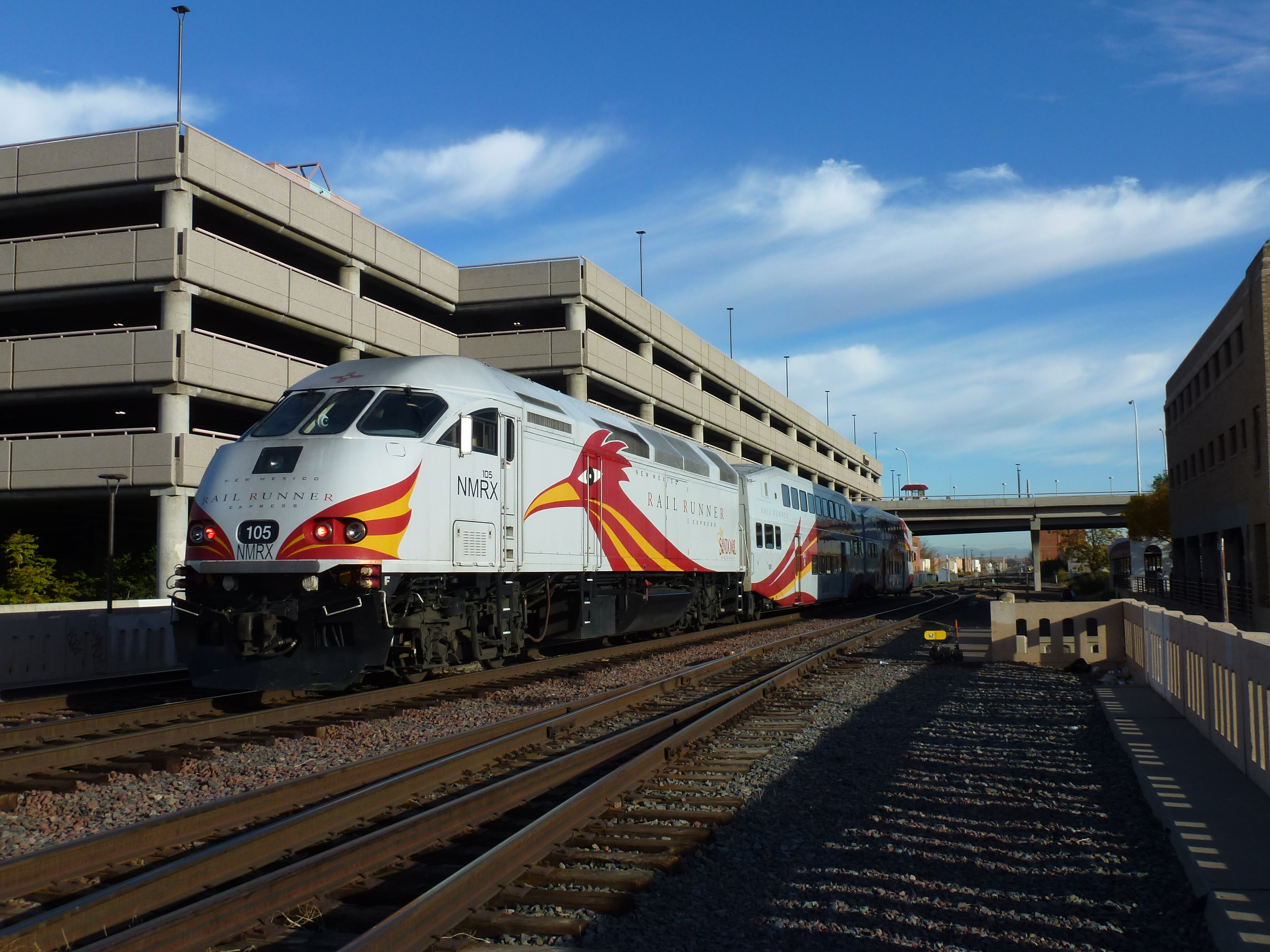 Rail Runner Regional Transportation Train, Albuquerque, 2012